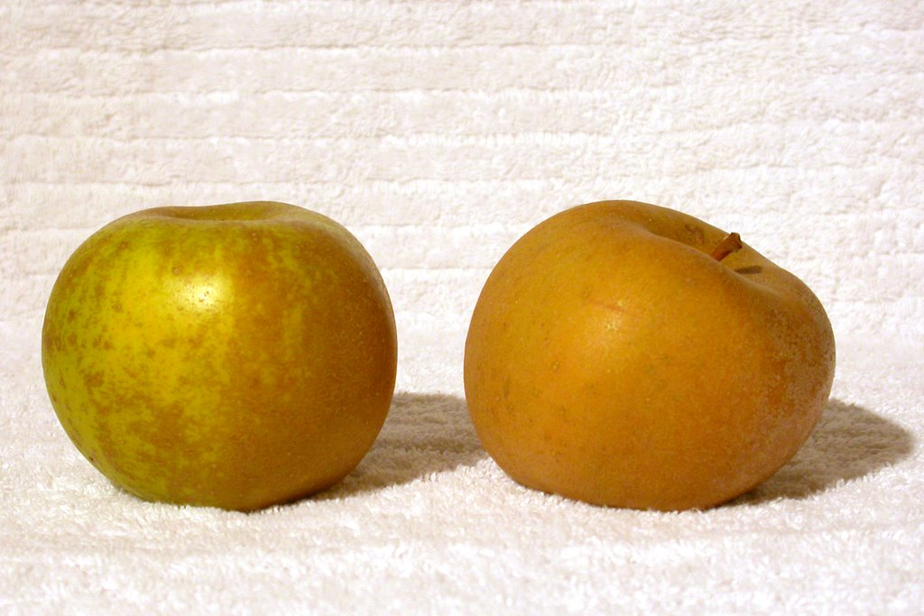 Golden russet apple - Pomme Reinette grise du Canada